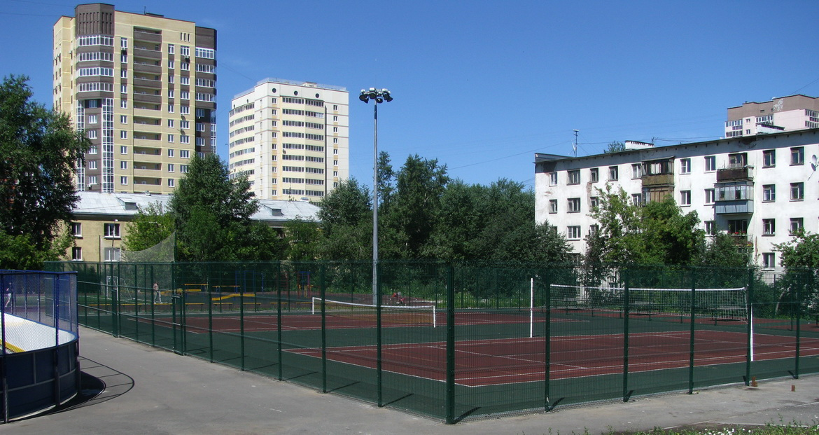 Спортивная площадка у гимназии №3 по ул. Июльской в Екатеринбурге